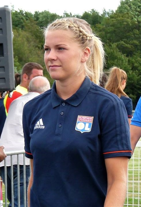 Ada Hegerberg le 20 août 2017 lors du match de préparartion face au TSG Hoffenheim à Vendenheim.